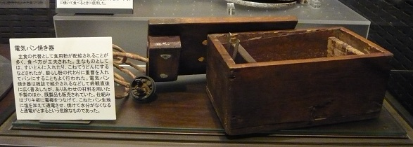 電気パン焼き器。東京九段下 昭和館の展示品。